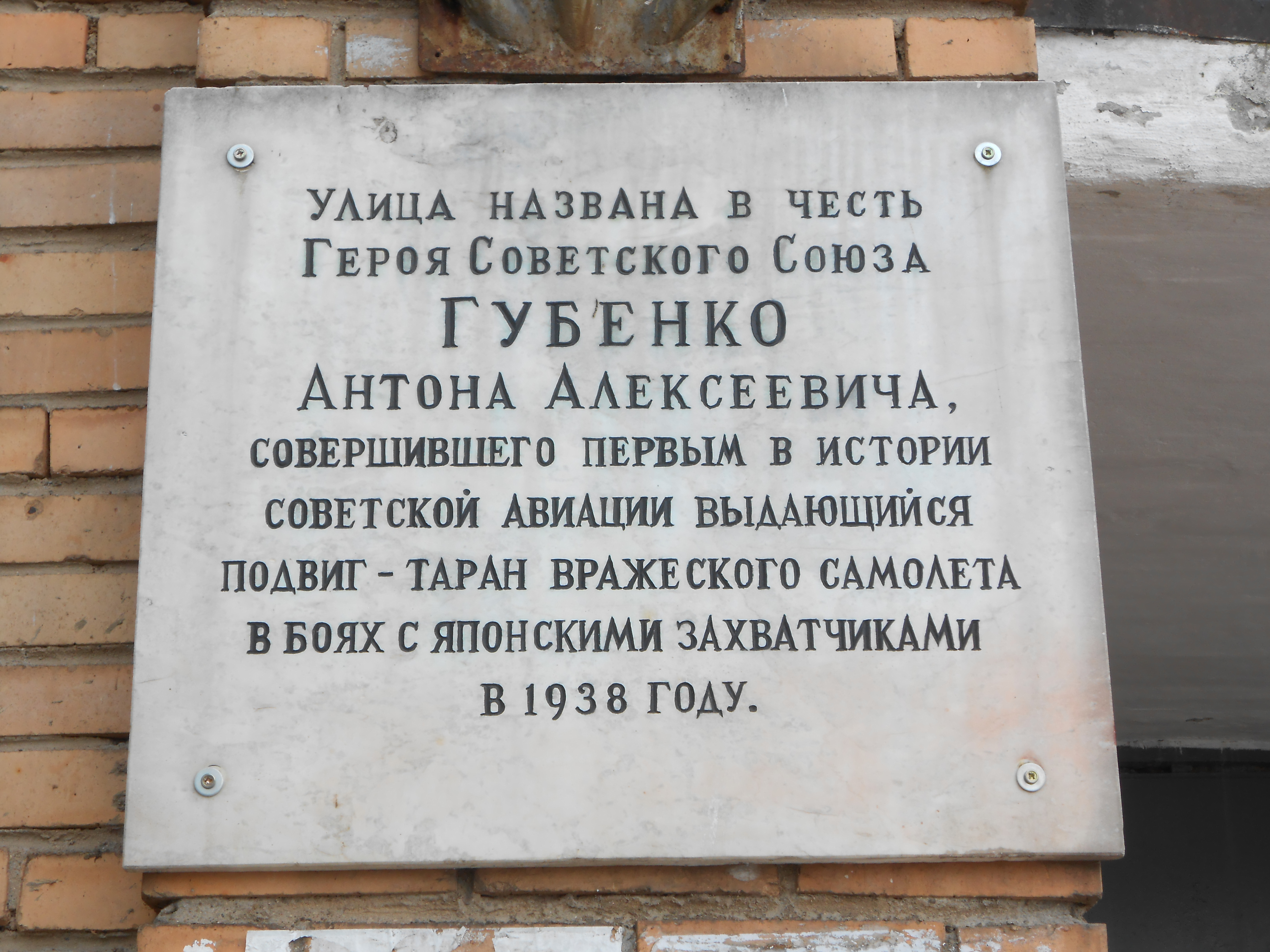 Смоленск, улица Губенко 2